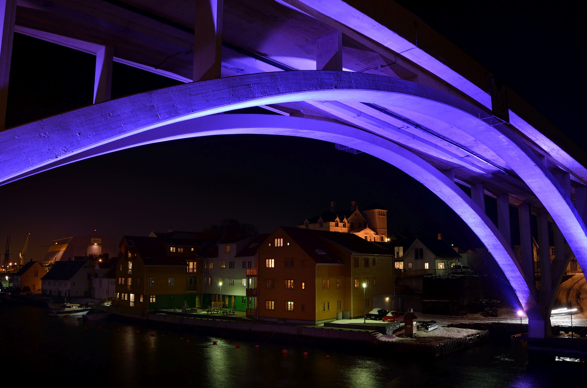 Hasseløy bru